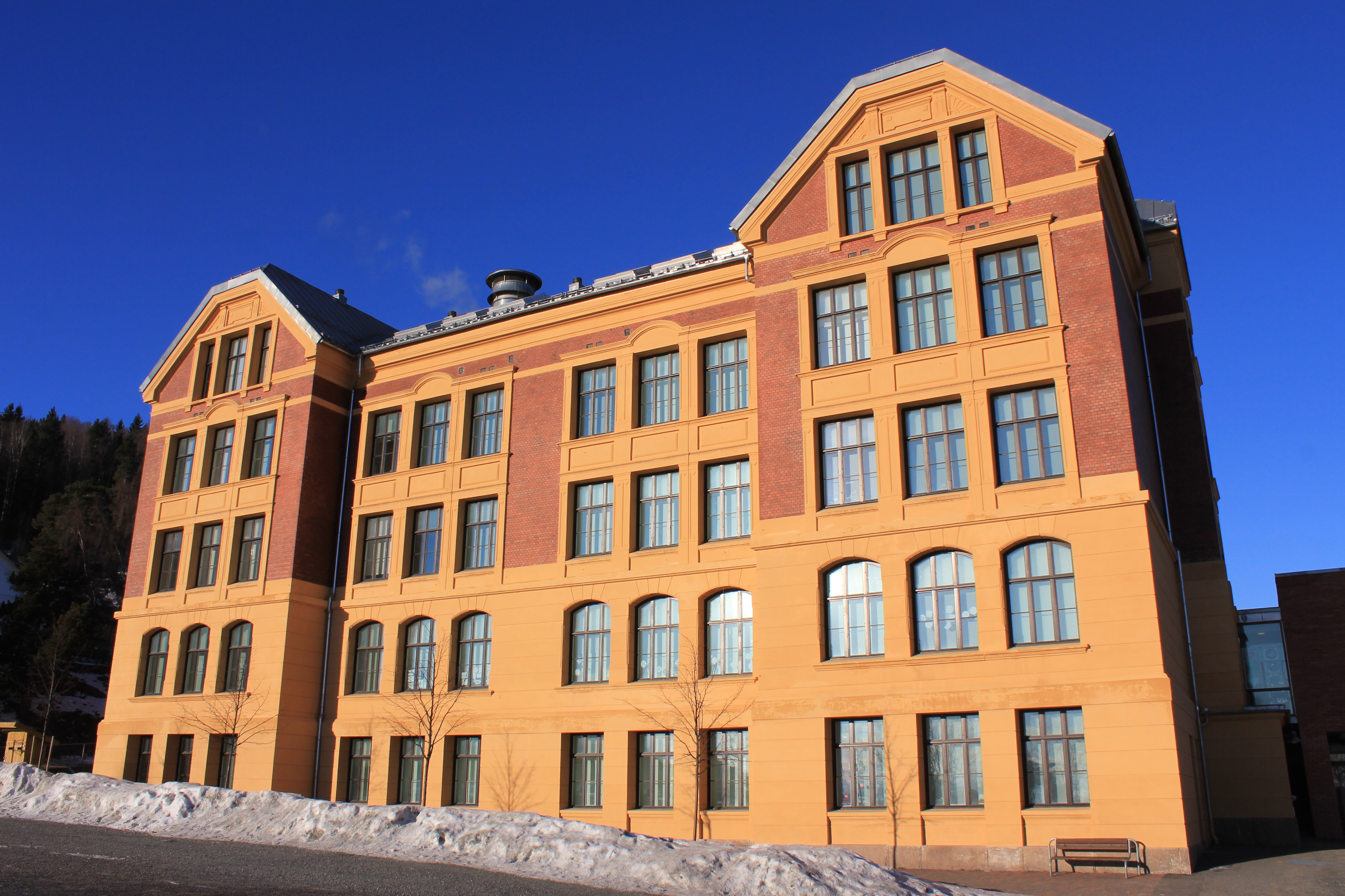 Gjøvik skole.